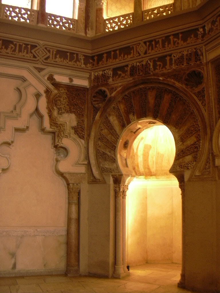 La Aljafería - Oratorio y Mihrab